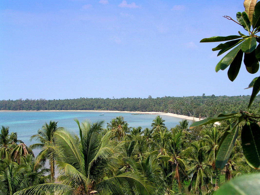 Koh Mak, Nordküste - Thailand